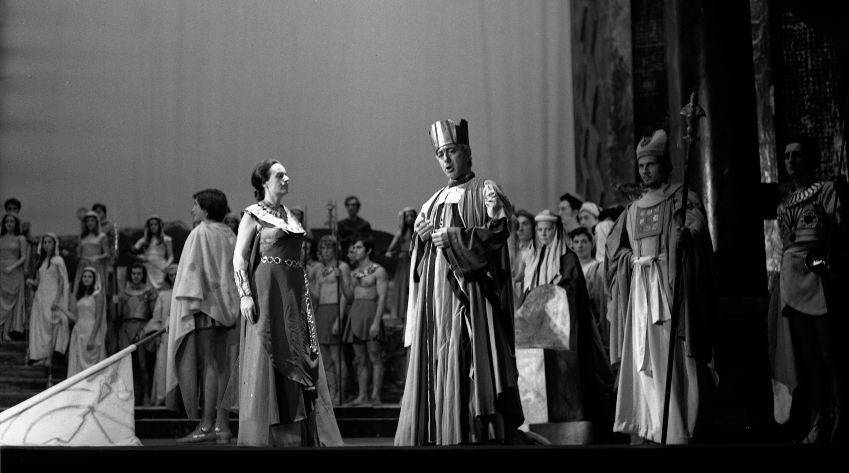 Théâtre du Capitole. Le 10 Décembre 1970. Vue de la représentation de La reine de Saba au théâtre du Capitole.